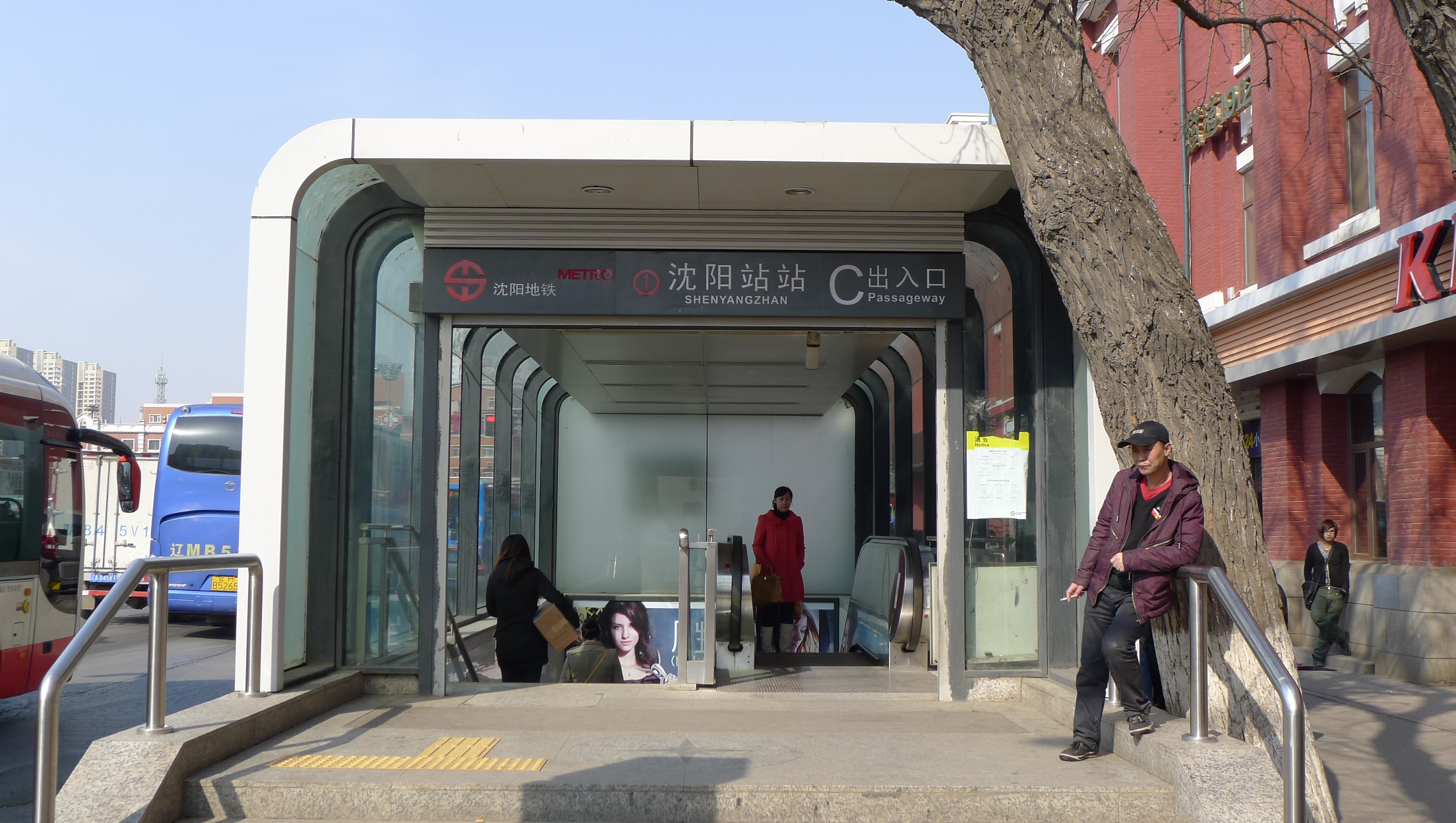 沈阳地铁一号线沈阳站站C出入口